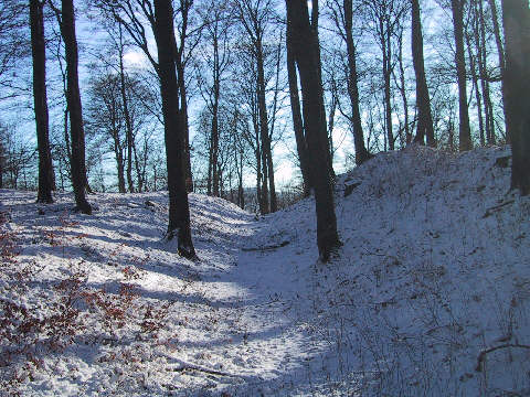 Borberg, Ringwall